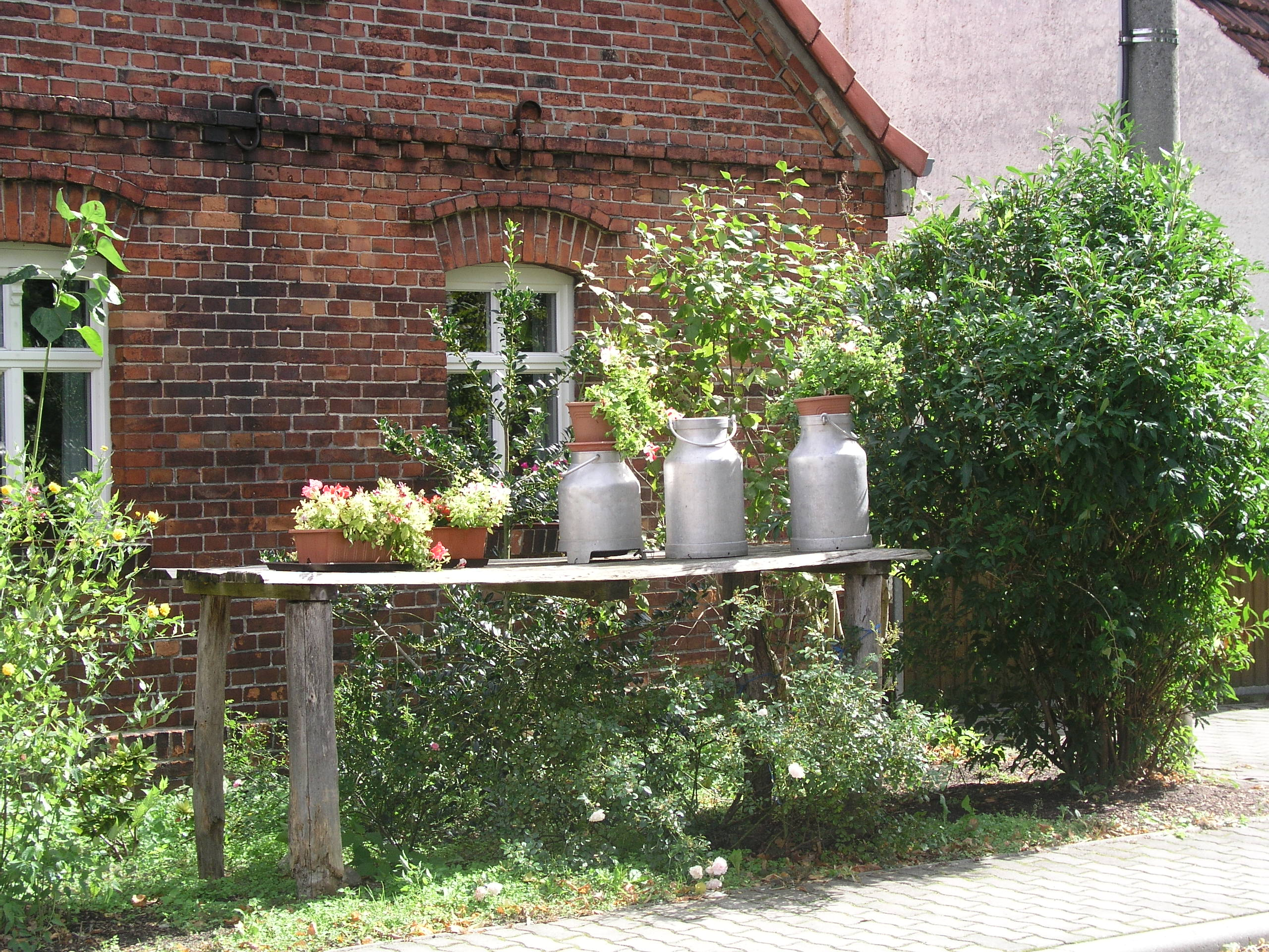 typisches Bauernhaus in Alt Zauche, mit historischem Milch-Abholtisch